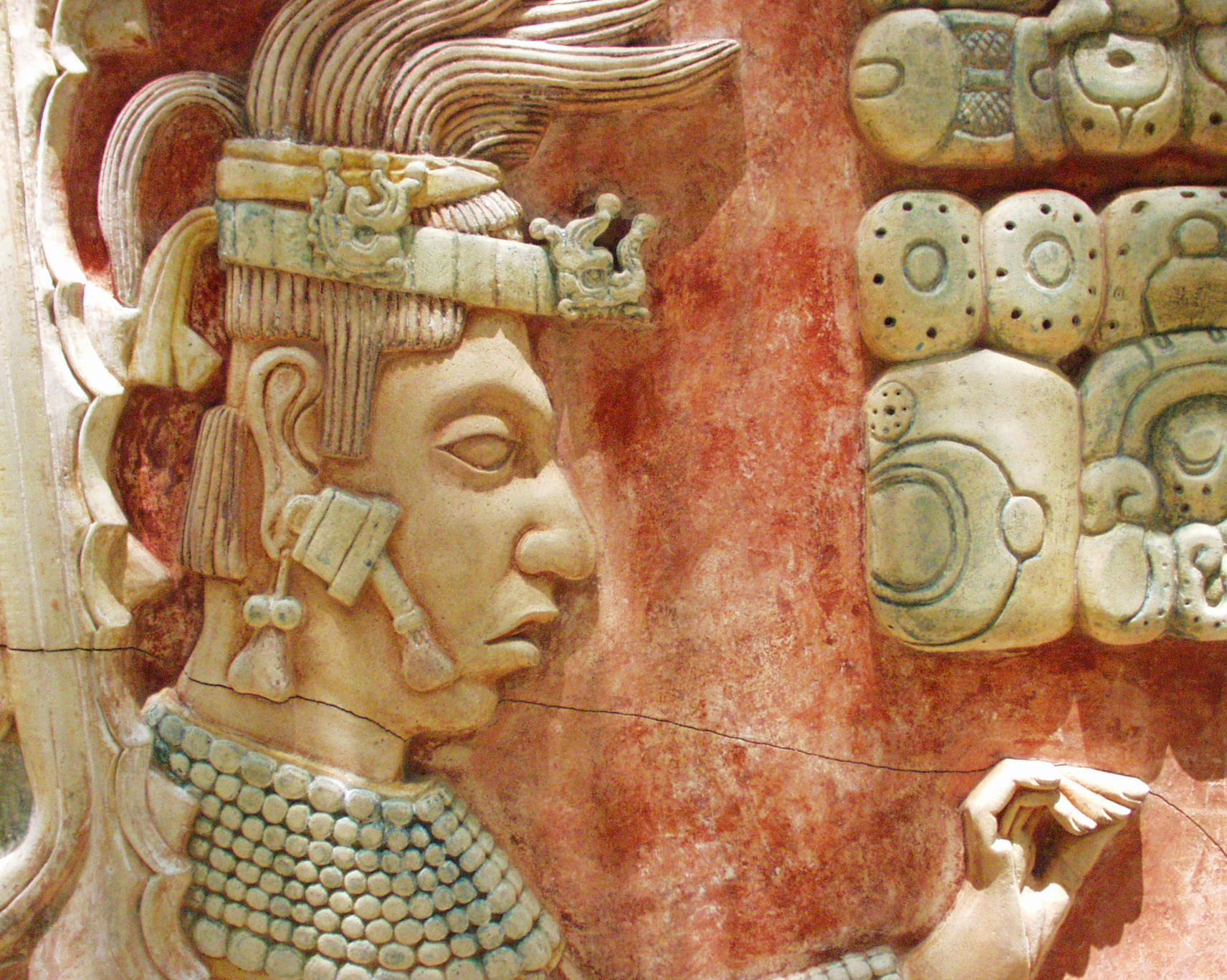 Site archéologique de Palenque. Pacal II.